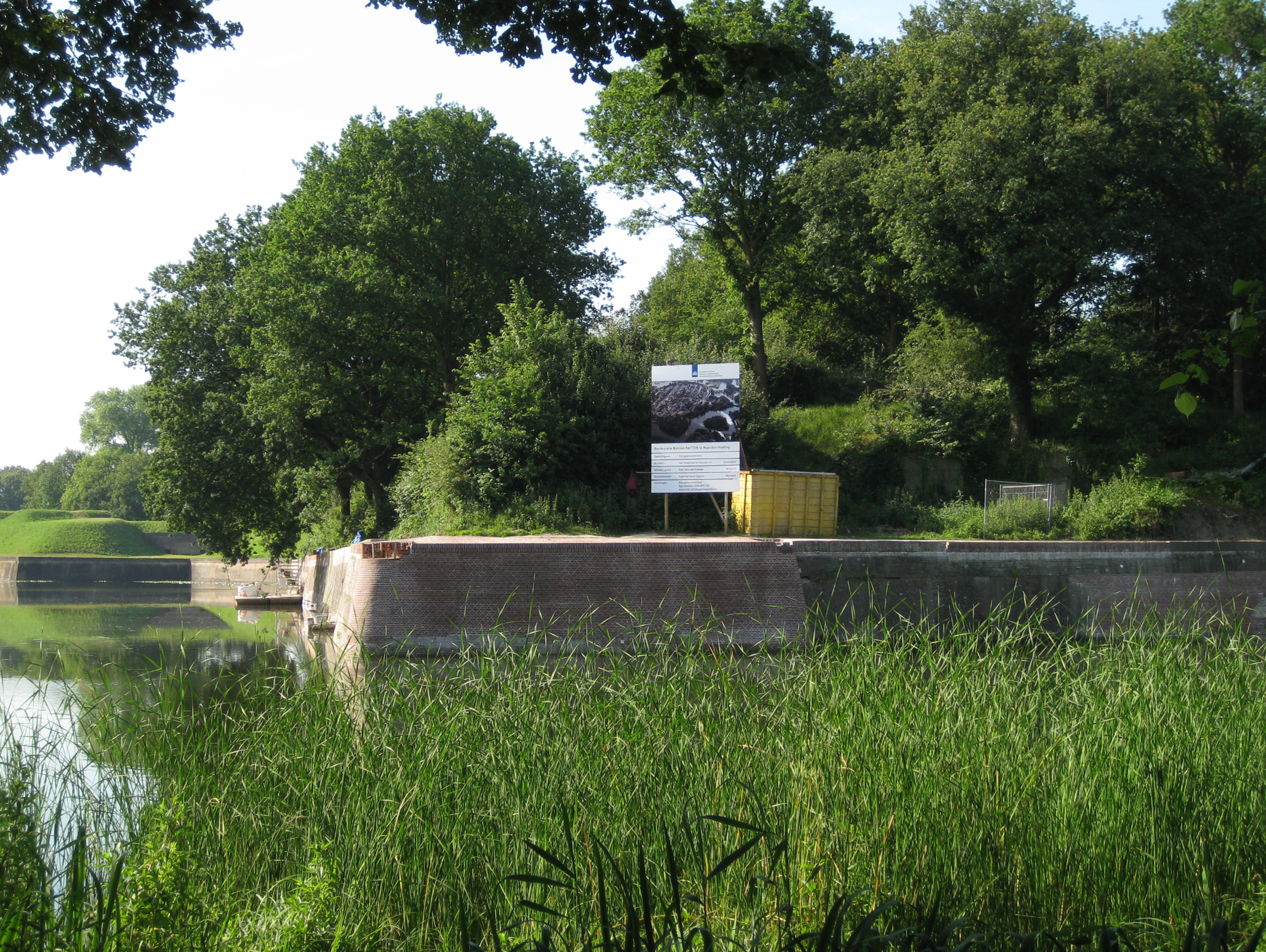 20100624 Naarden Bastion Katten Kloosterstraat t.o. 80 001.JPG, rijksmonument in Naarden-Vesting